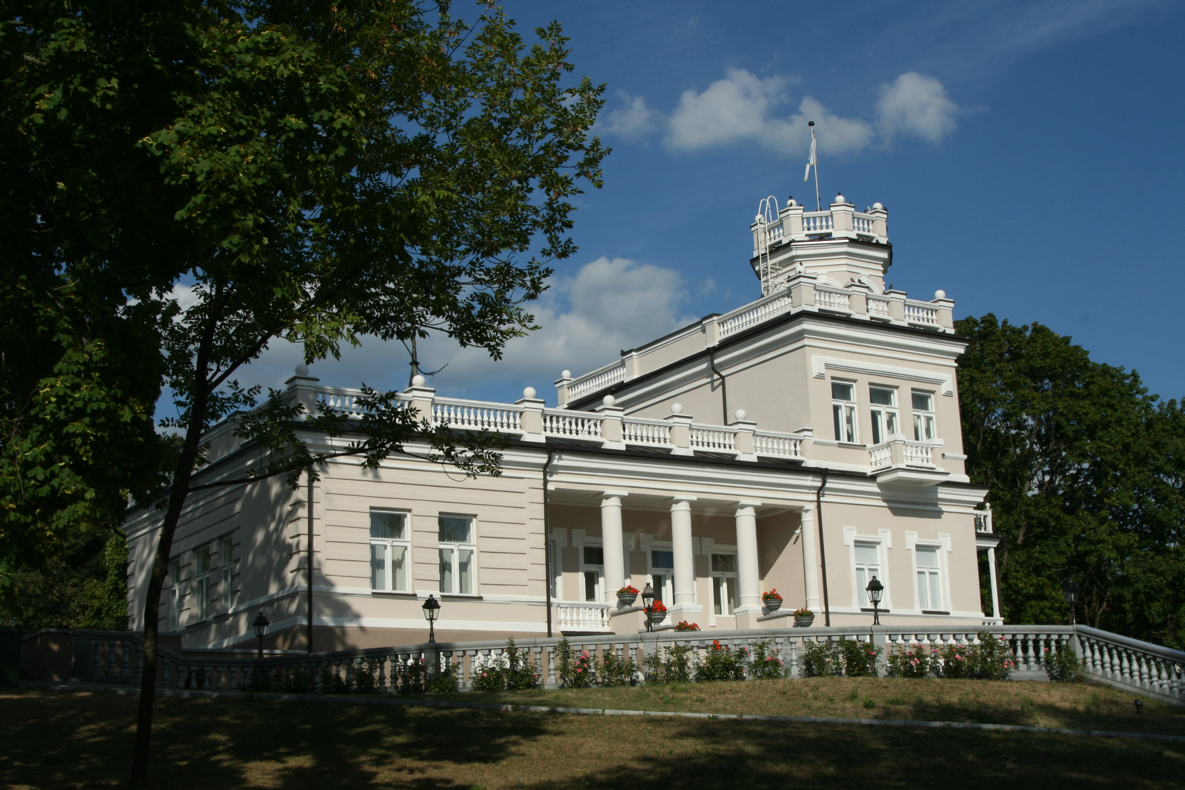 Druskininkai, Lithuania